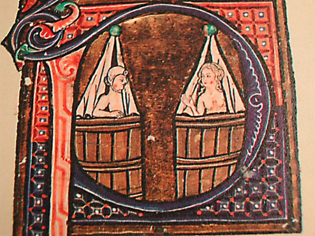 Medieval bath